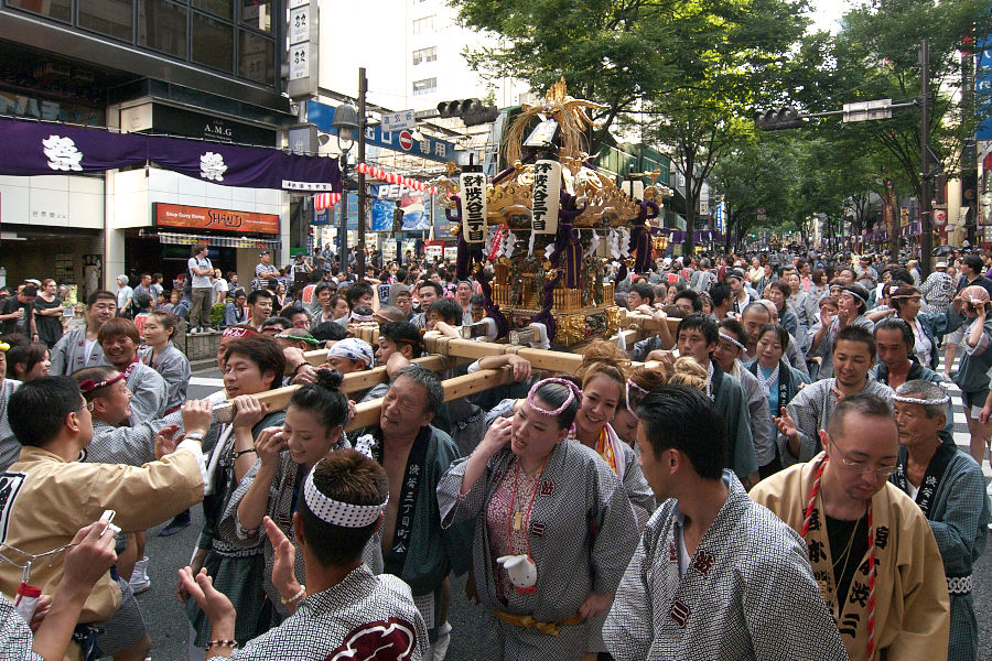 渋谷道玄坂を行く金王八幡宮秋祭りの神輿。東京都渋谷区渋谷